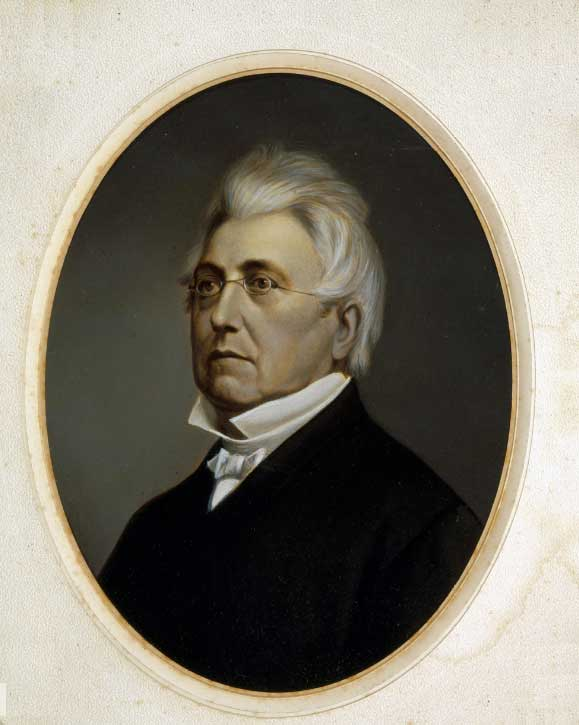 Portret van Jan Lodewijk Gregory Oyens (1806-1873)